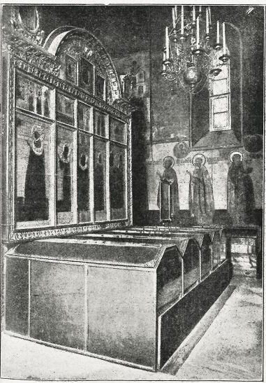 Фото из журнала "Родина".